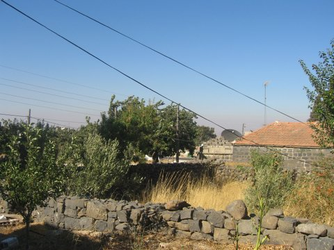 بئر عجم قرية شركسية في سوريا.